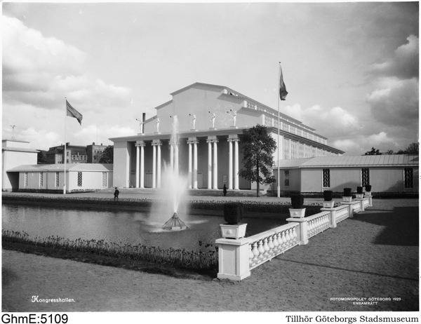 Kongresshallen på Liseberg i göteborg. Hallen brann ner till grunden 1973